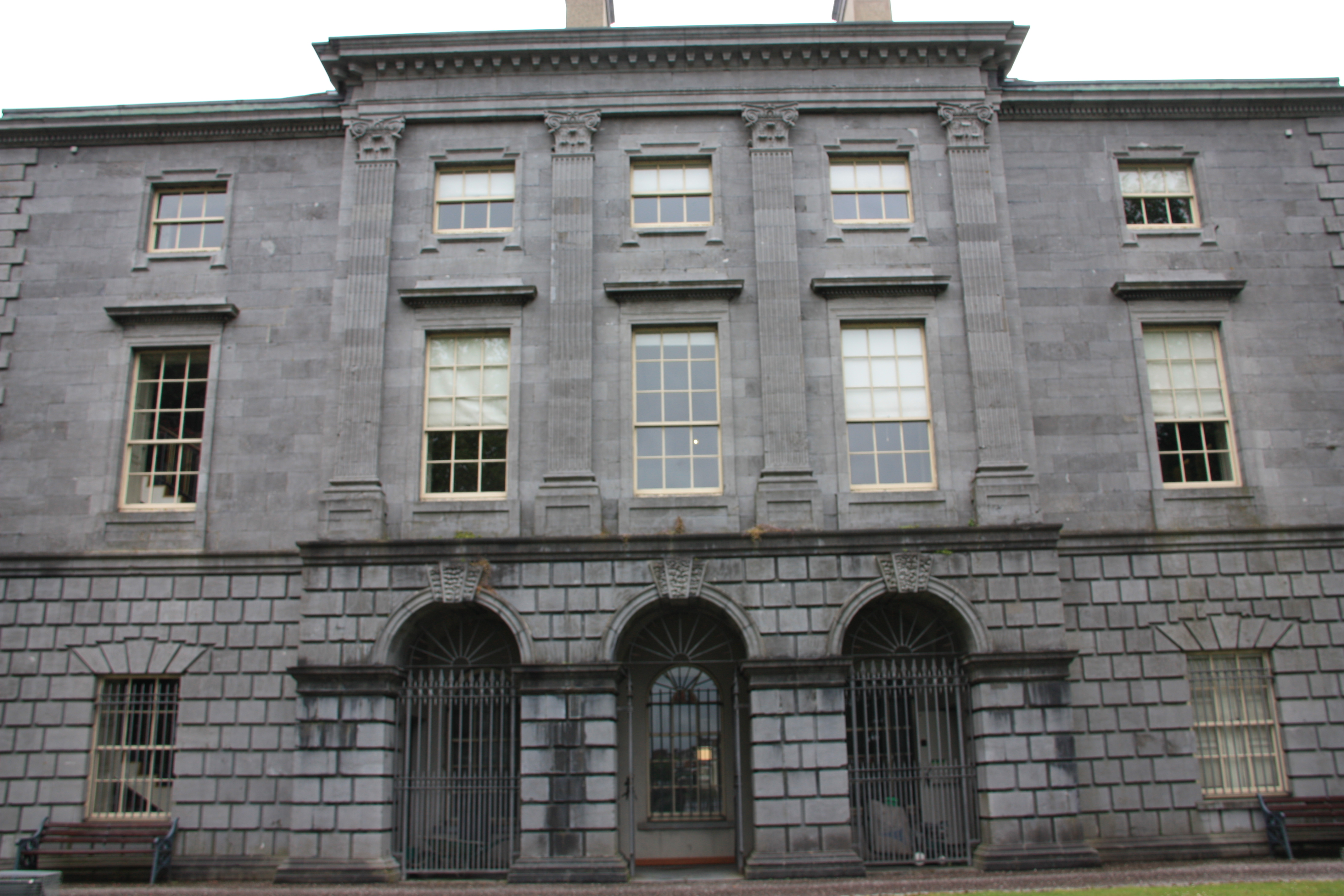 Den opprinnelige fasaden mot Shannonelven til Hunt museet i Limerick. Huset var tollstasjon med styrerboligUnknown